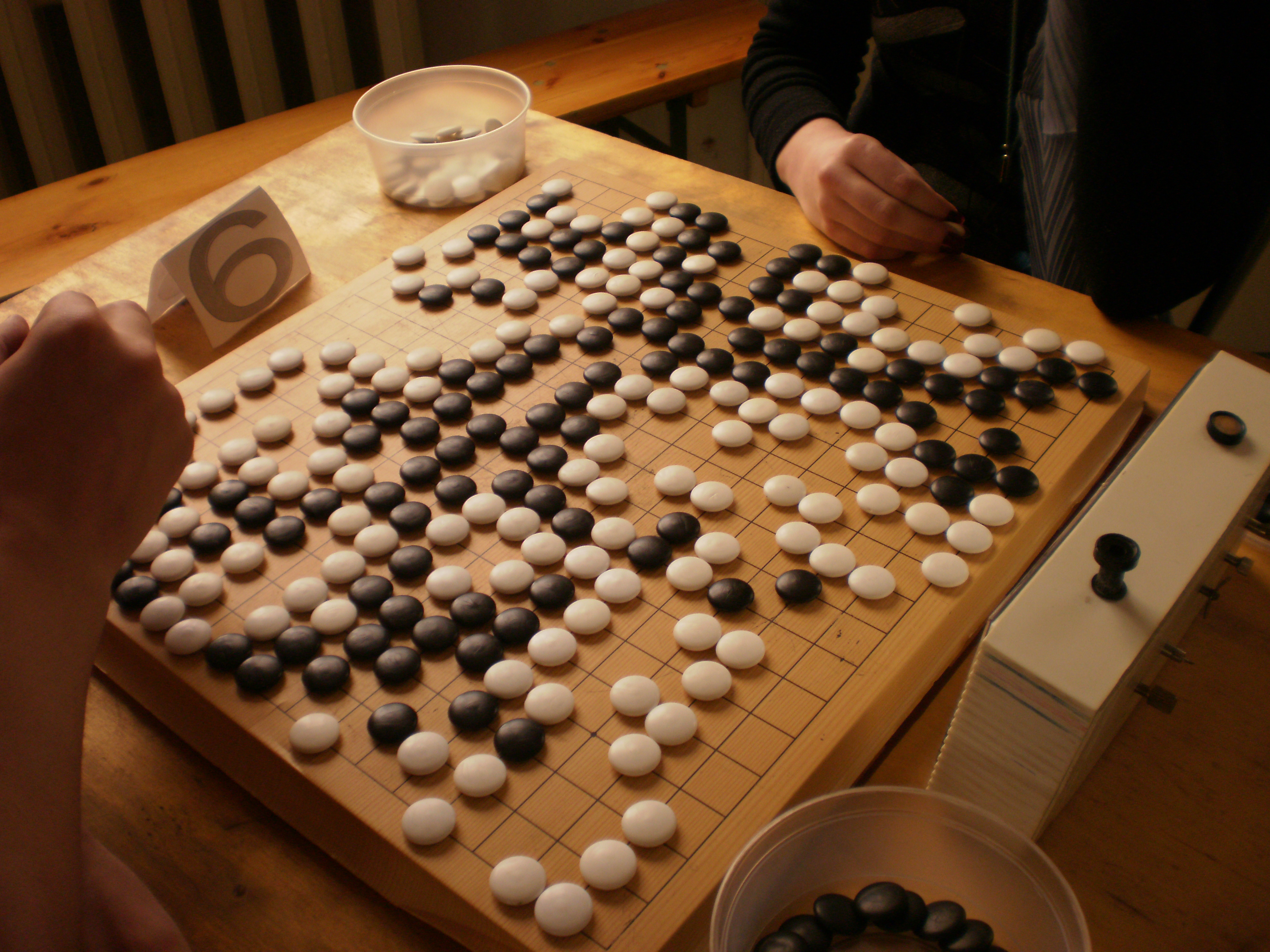 Партия с чемпионата Ярославля по го 2011